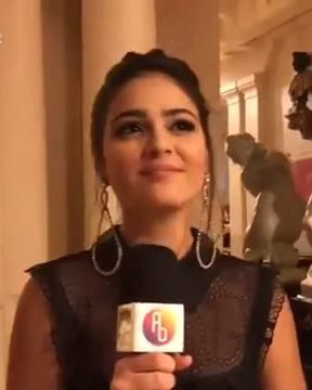 Atriz brasileira Giullia Buscacio fala em entrevista sobre sua personagem na telenovela